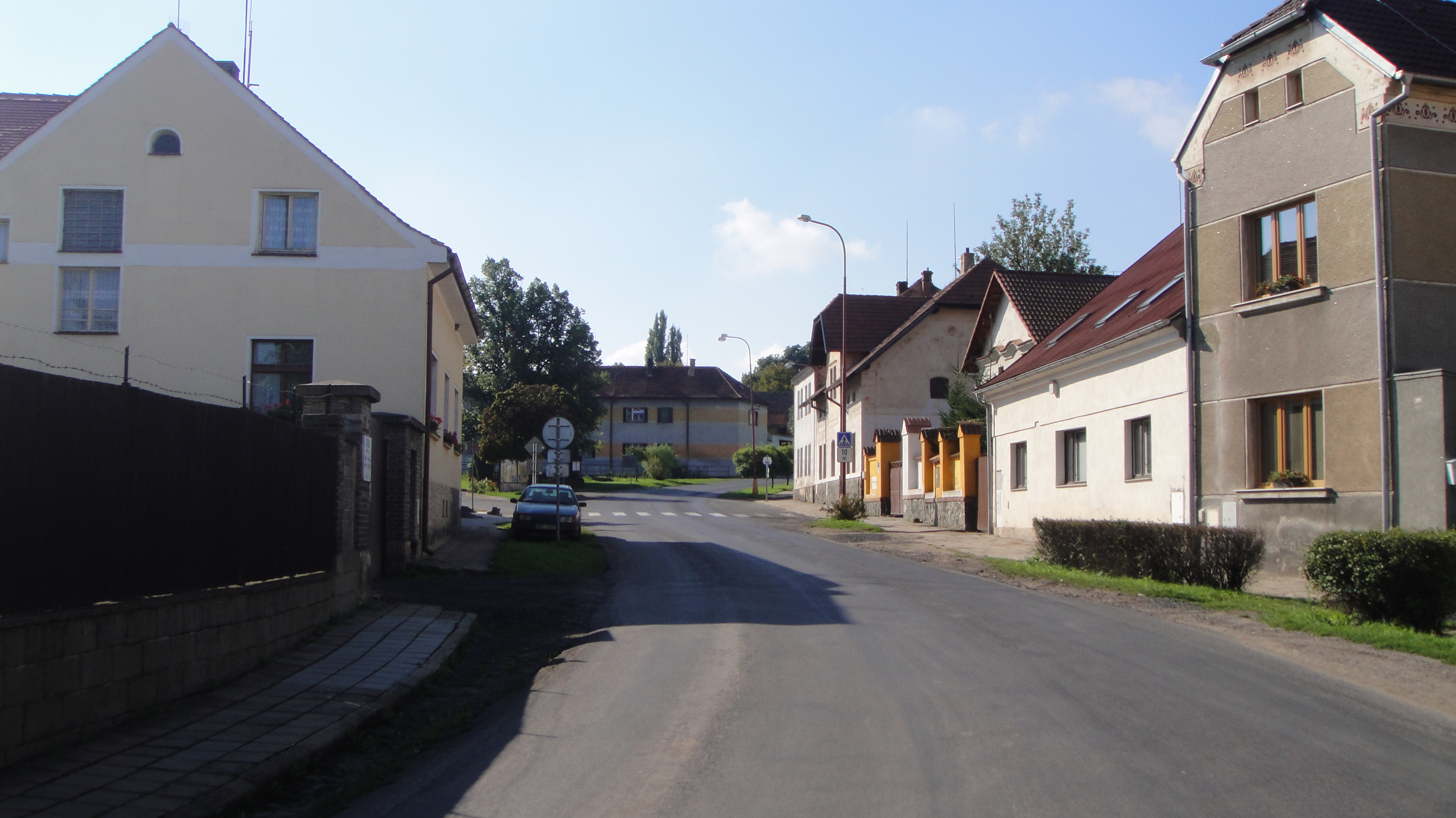 Pohled silnice směr Rakovník.